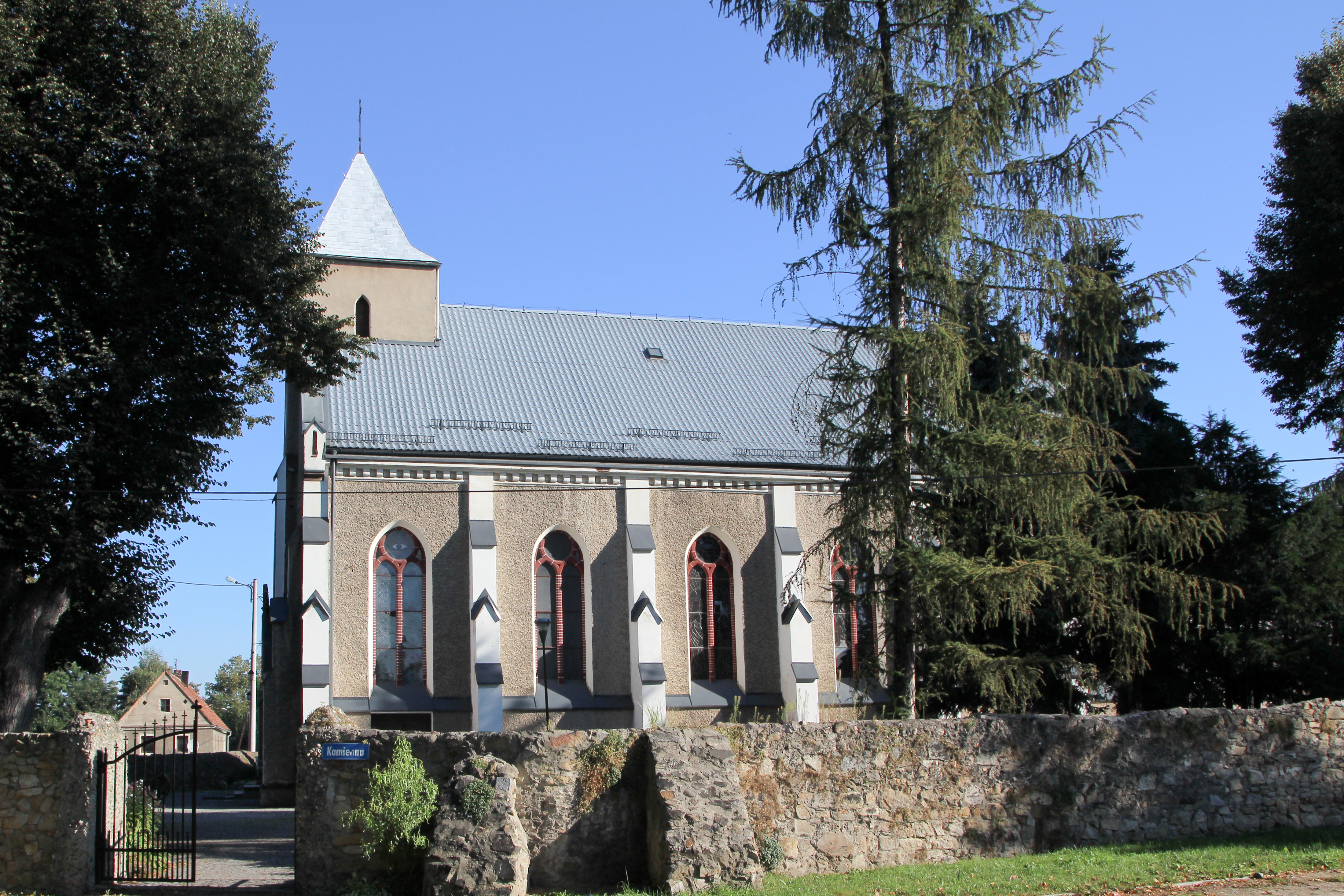 Biała Nyska – wieś w Polsce położona w województwie opolskim, w powiecie nyskim, w gminie Nysa.